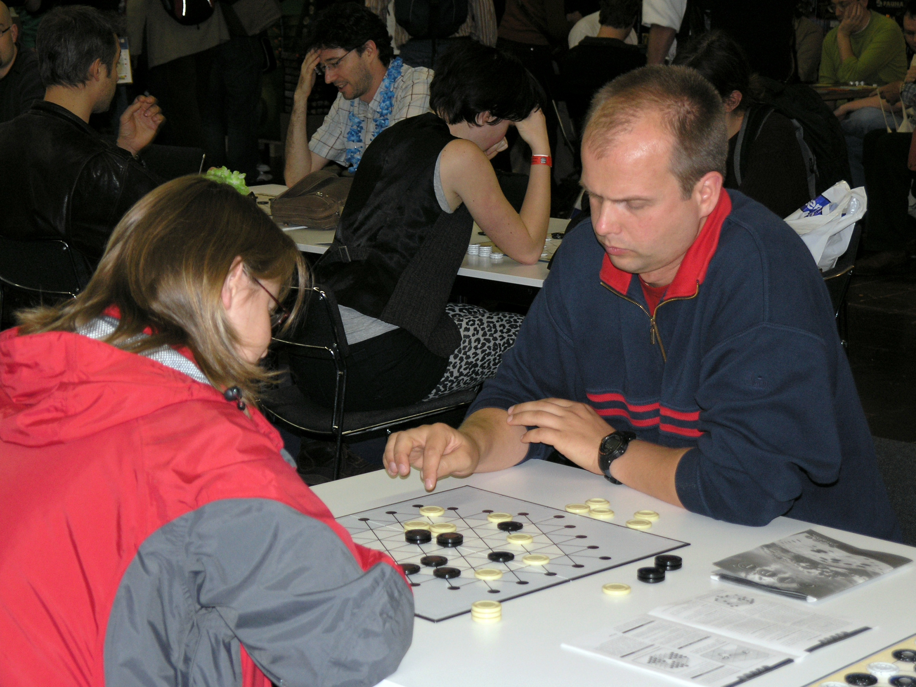 Internationalen Spieltage SPIEL 2008